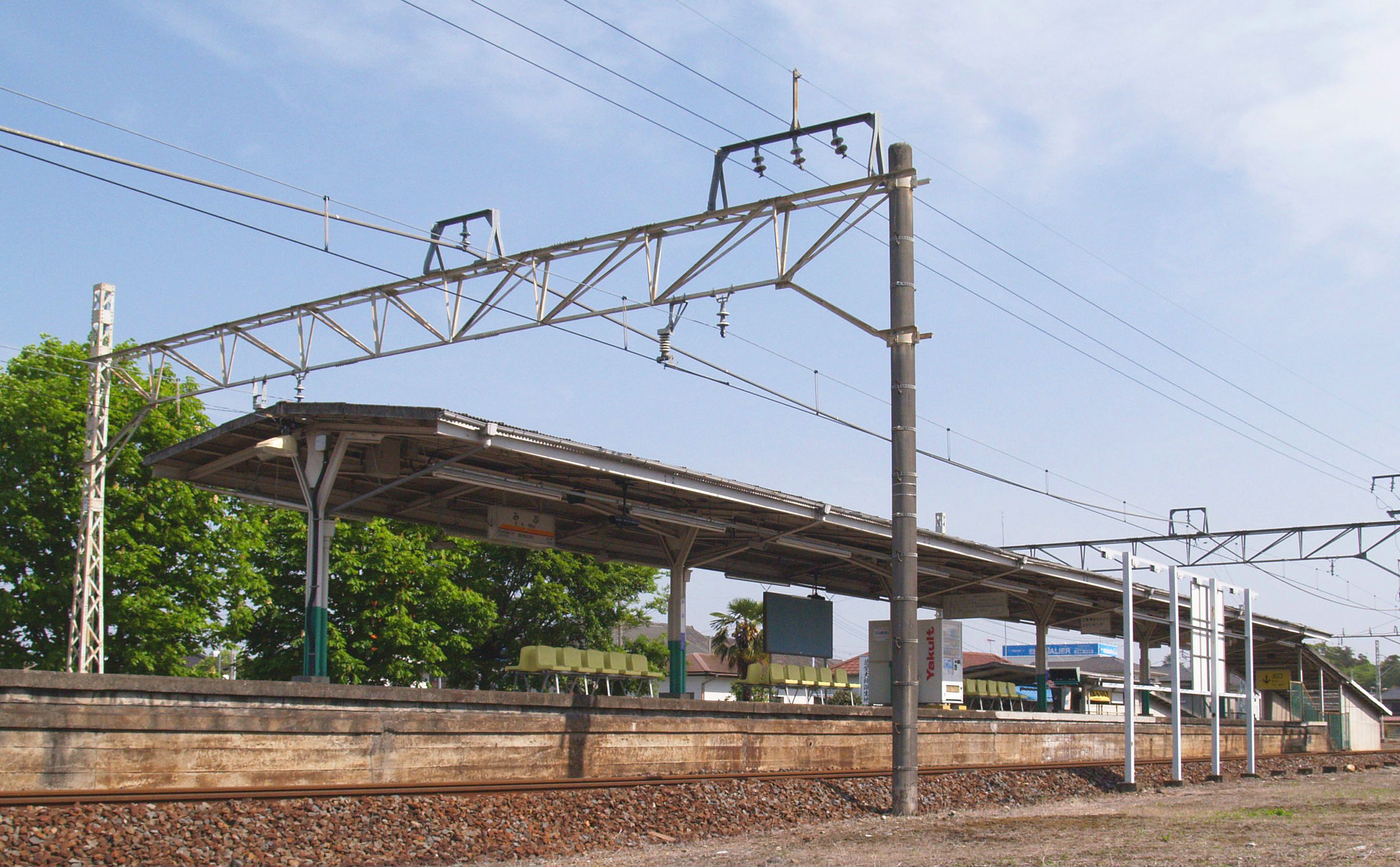 壬生駅ホーム